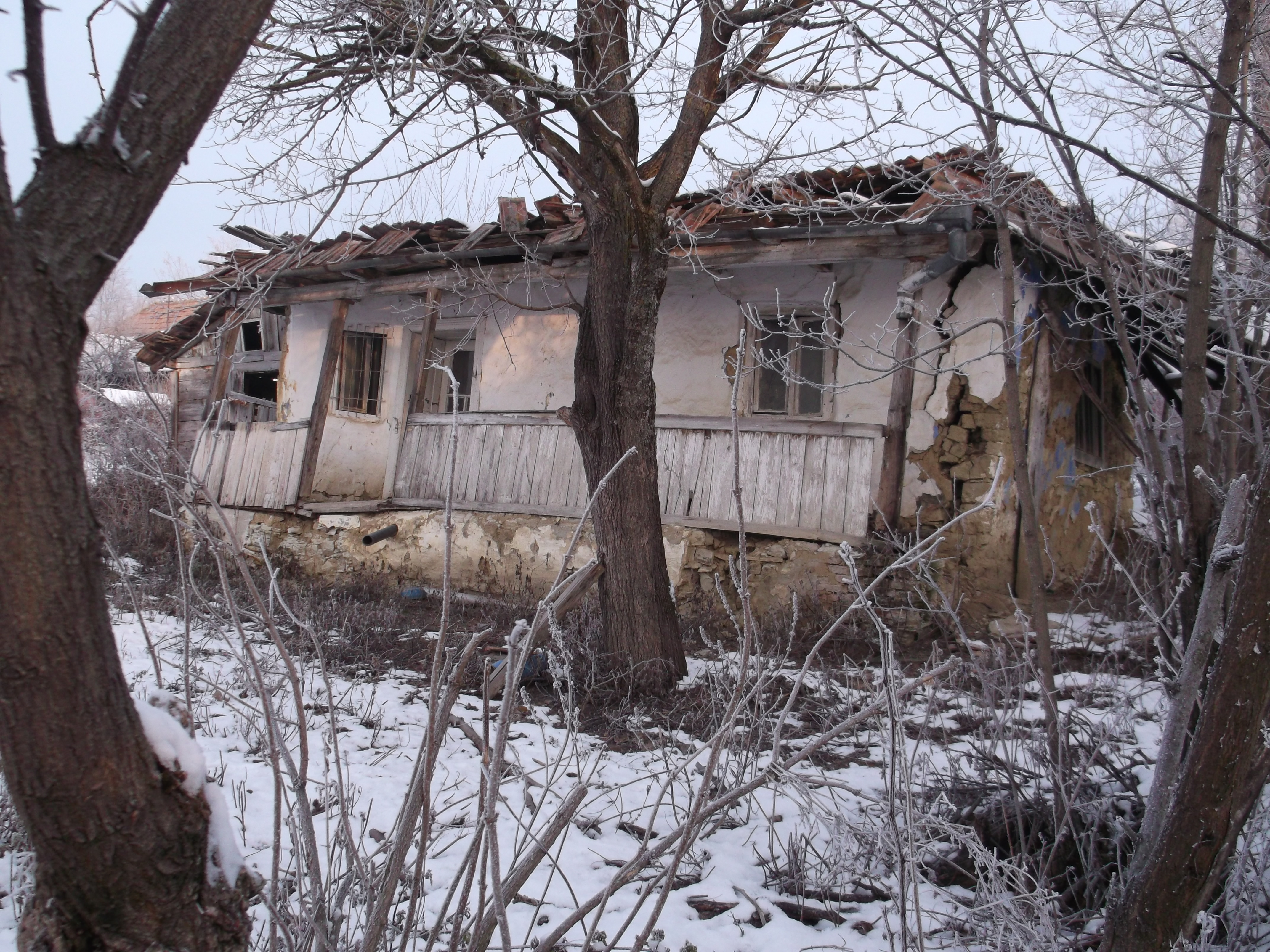 Aruncuta - abandonarea caselor , o forma de manifestare a saraciei si neputintei .